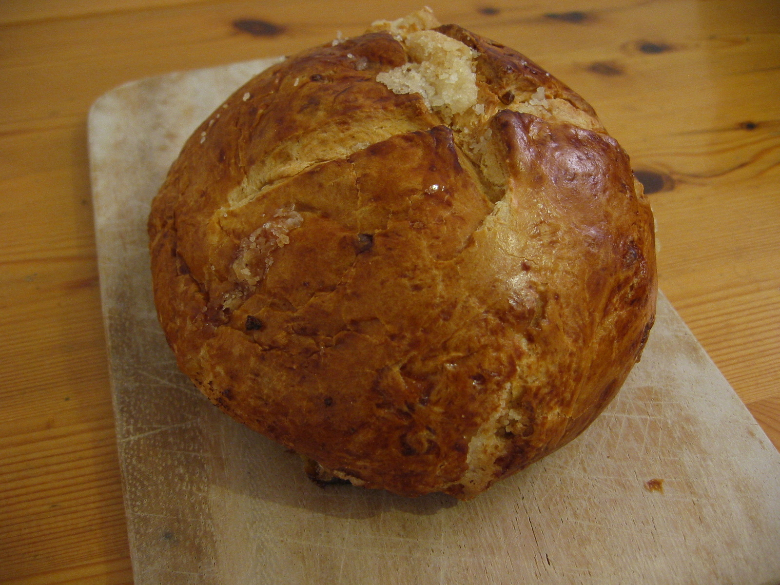 Ein Poschweck der Aachener Bäckerei Nobis Printen